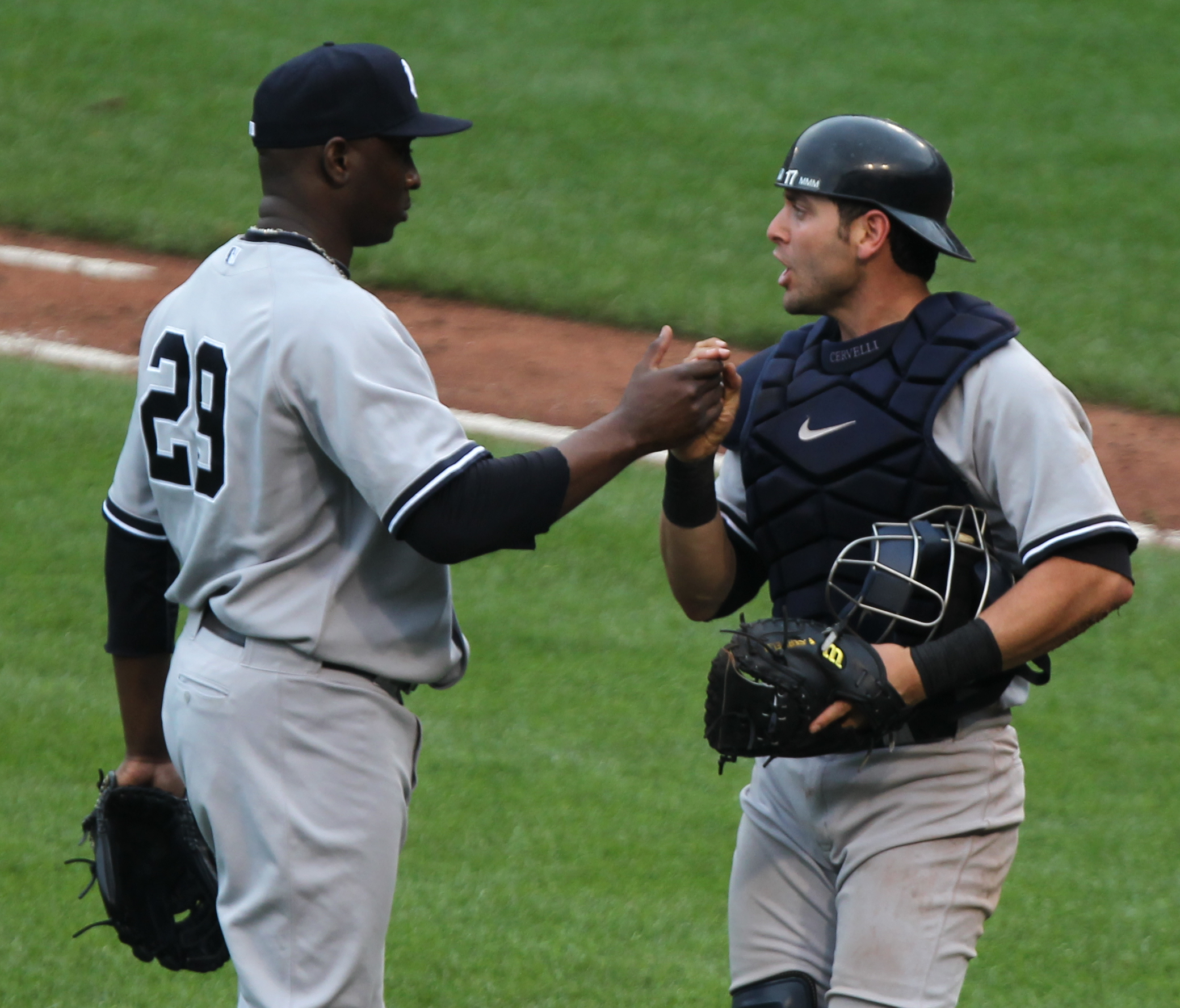 Yankees at Orioles September 8, 2011